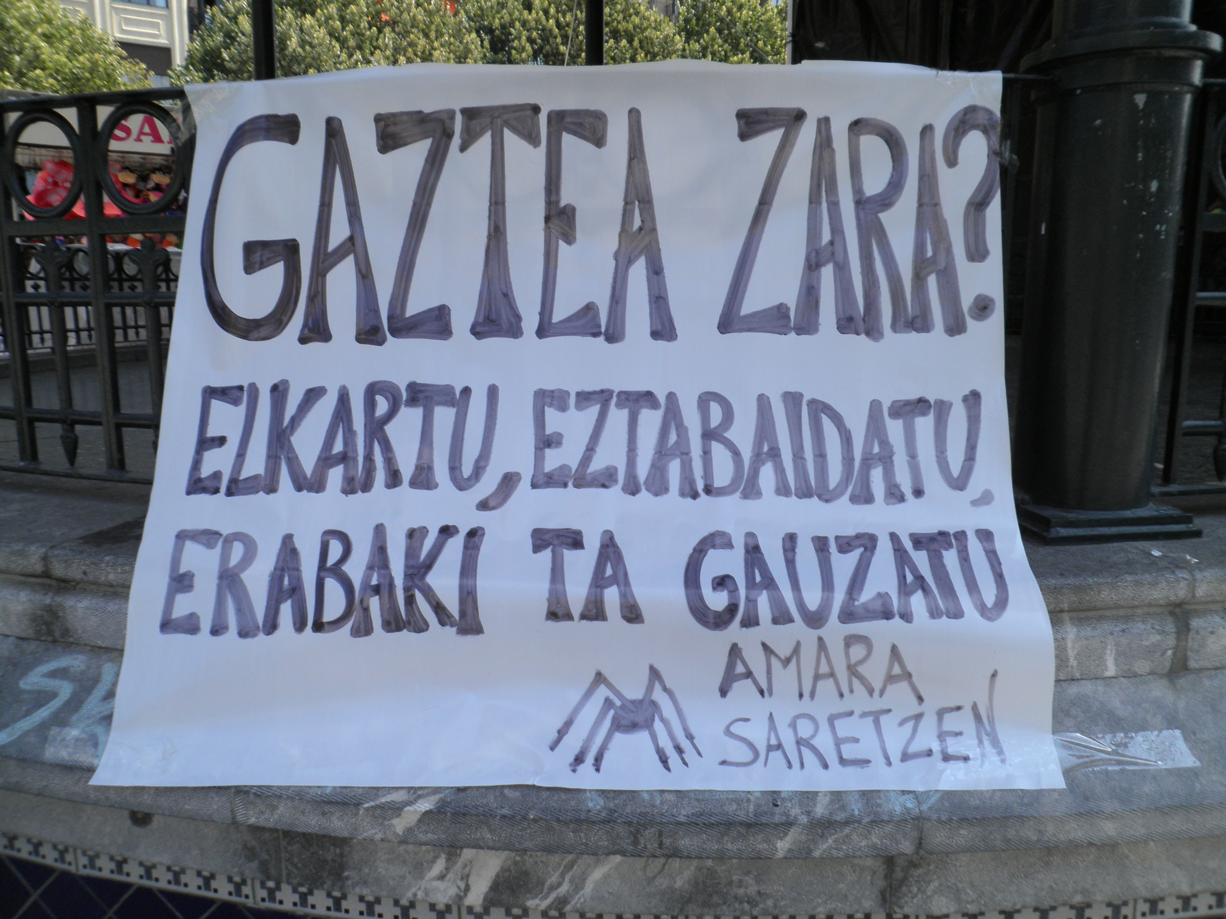 Marasma saretzen. Amara.